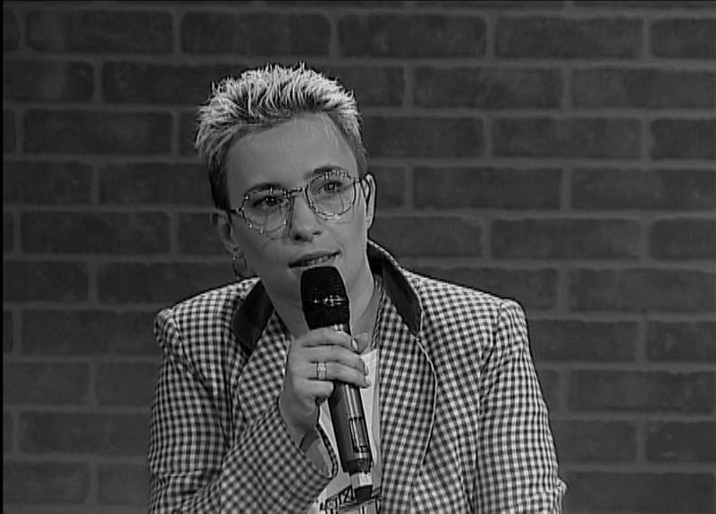 Євгенія Стрижевська